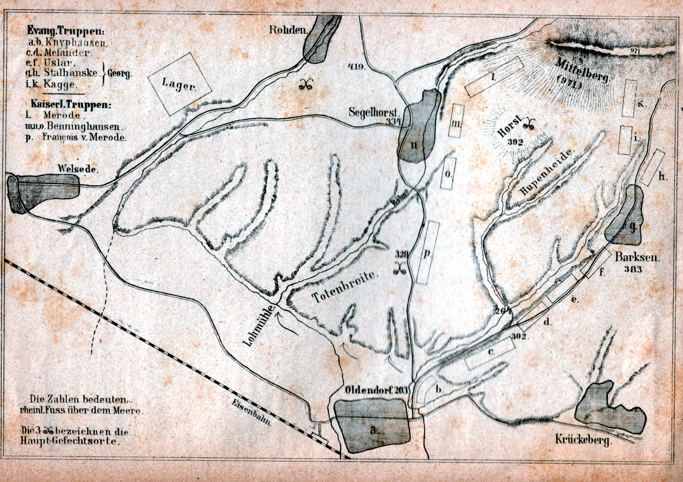 Schlacht bei Oldendorf 1633